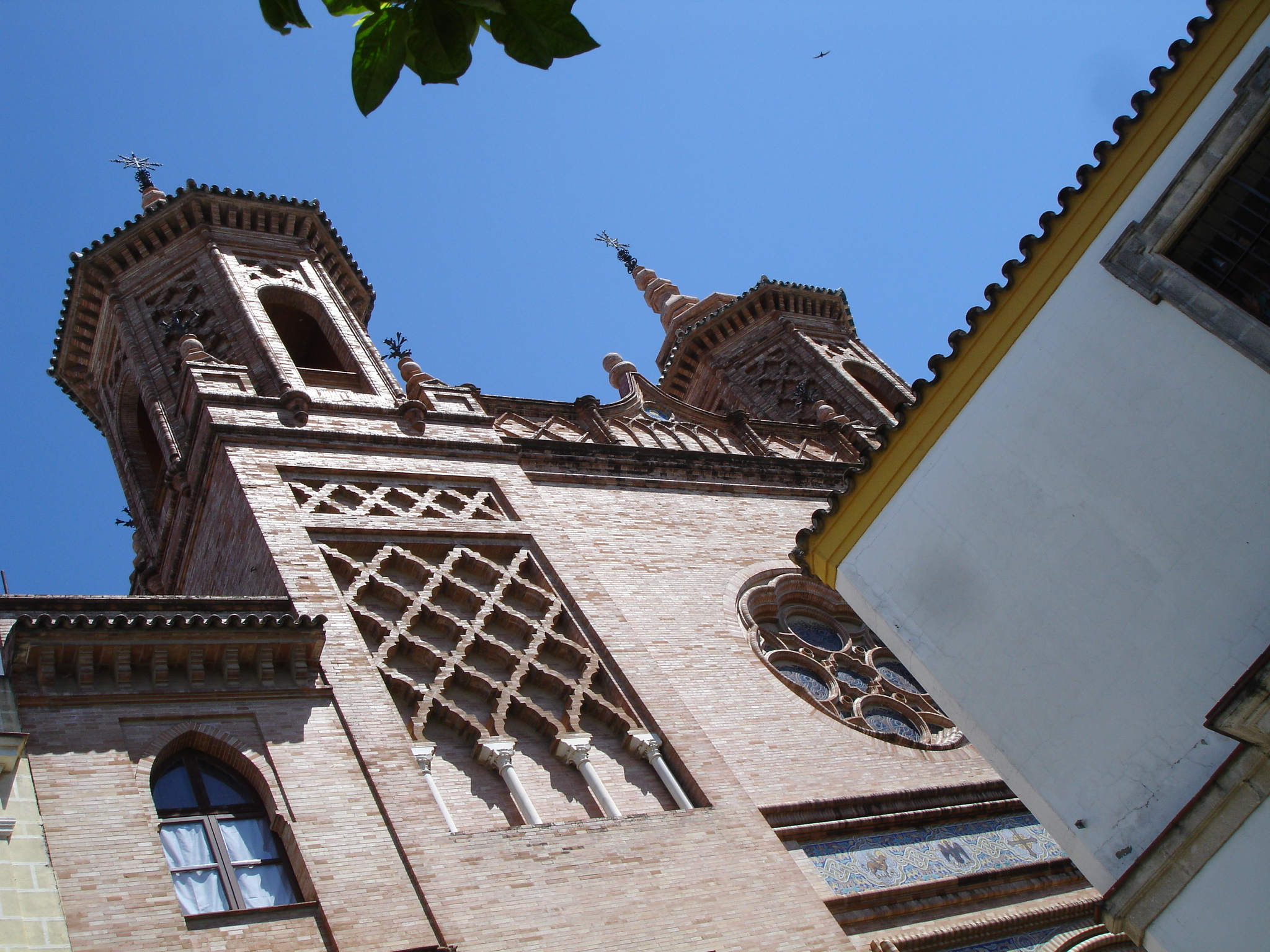 Convento de Las Reparadoras de Jerez de la Frontera